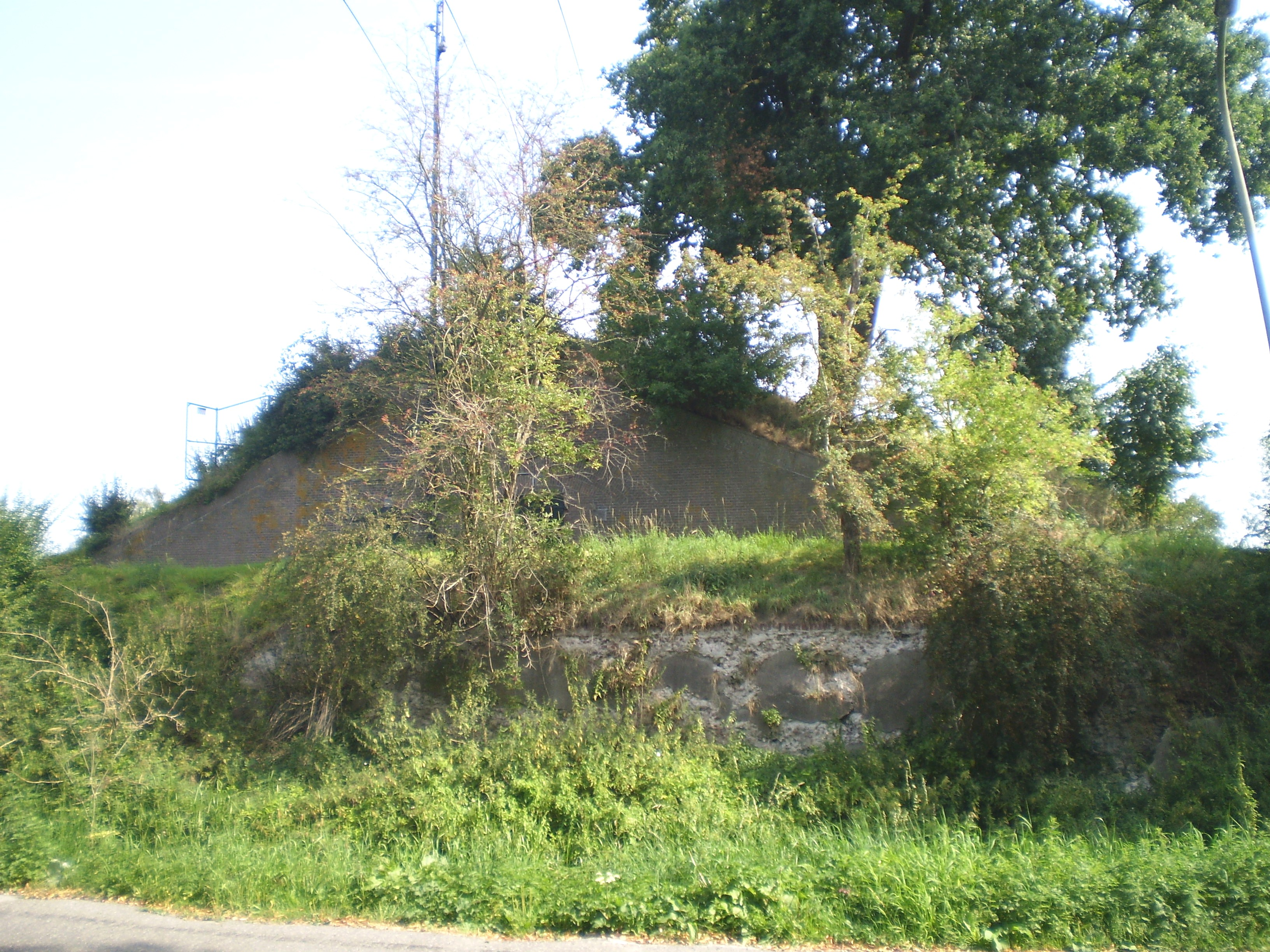 Fort De Gagel.